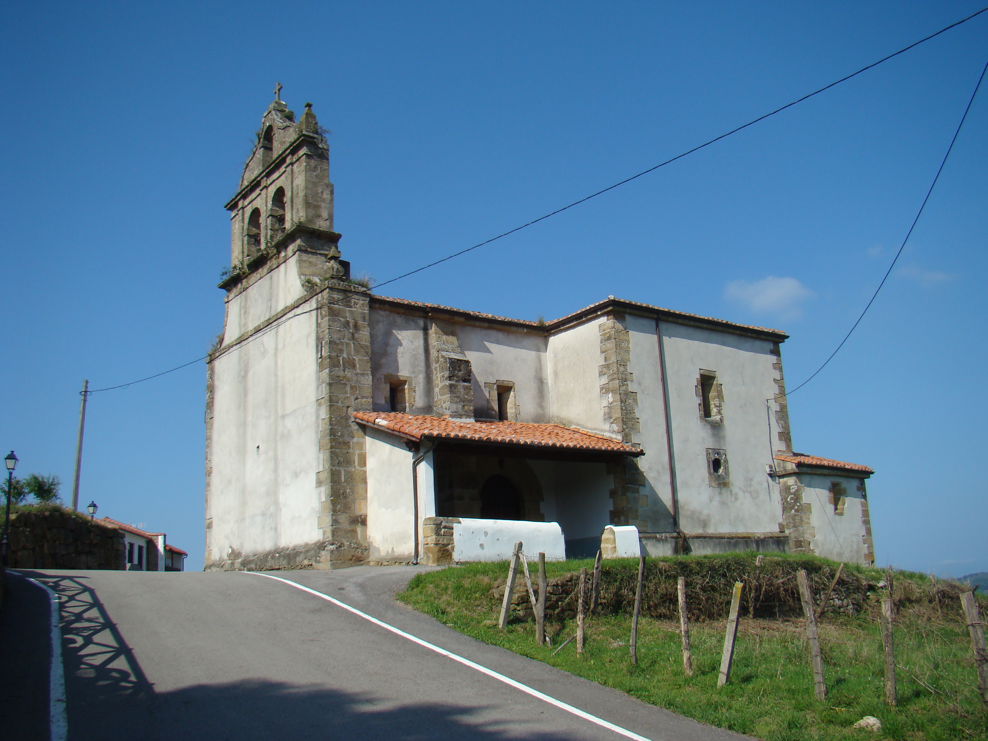 San Bartolomé de Meruelo, localidad de Meruelo en Cantabria (España). Iglesia de San Bartolomé.